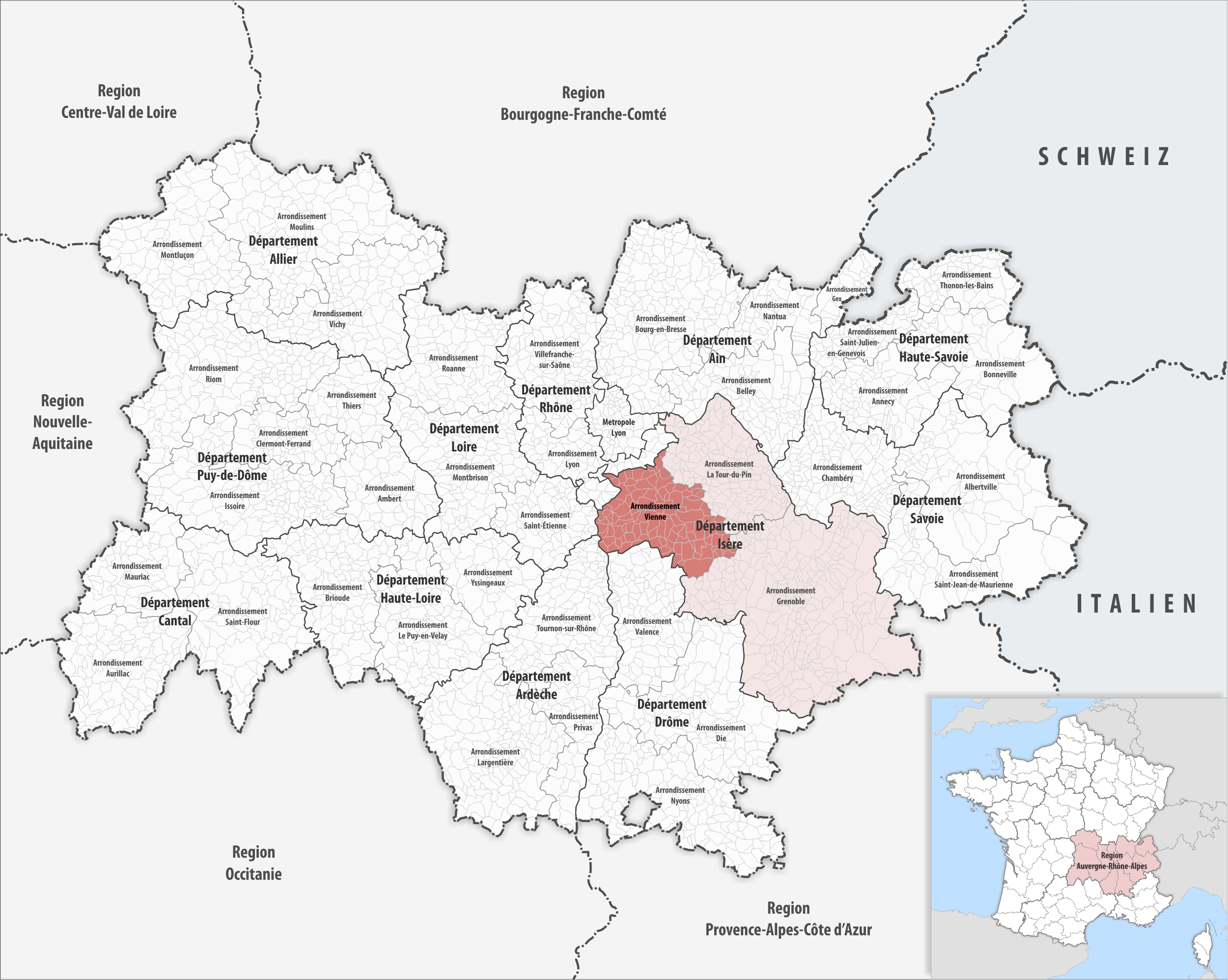 Lage des Arrondissements Vienne